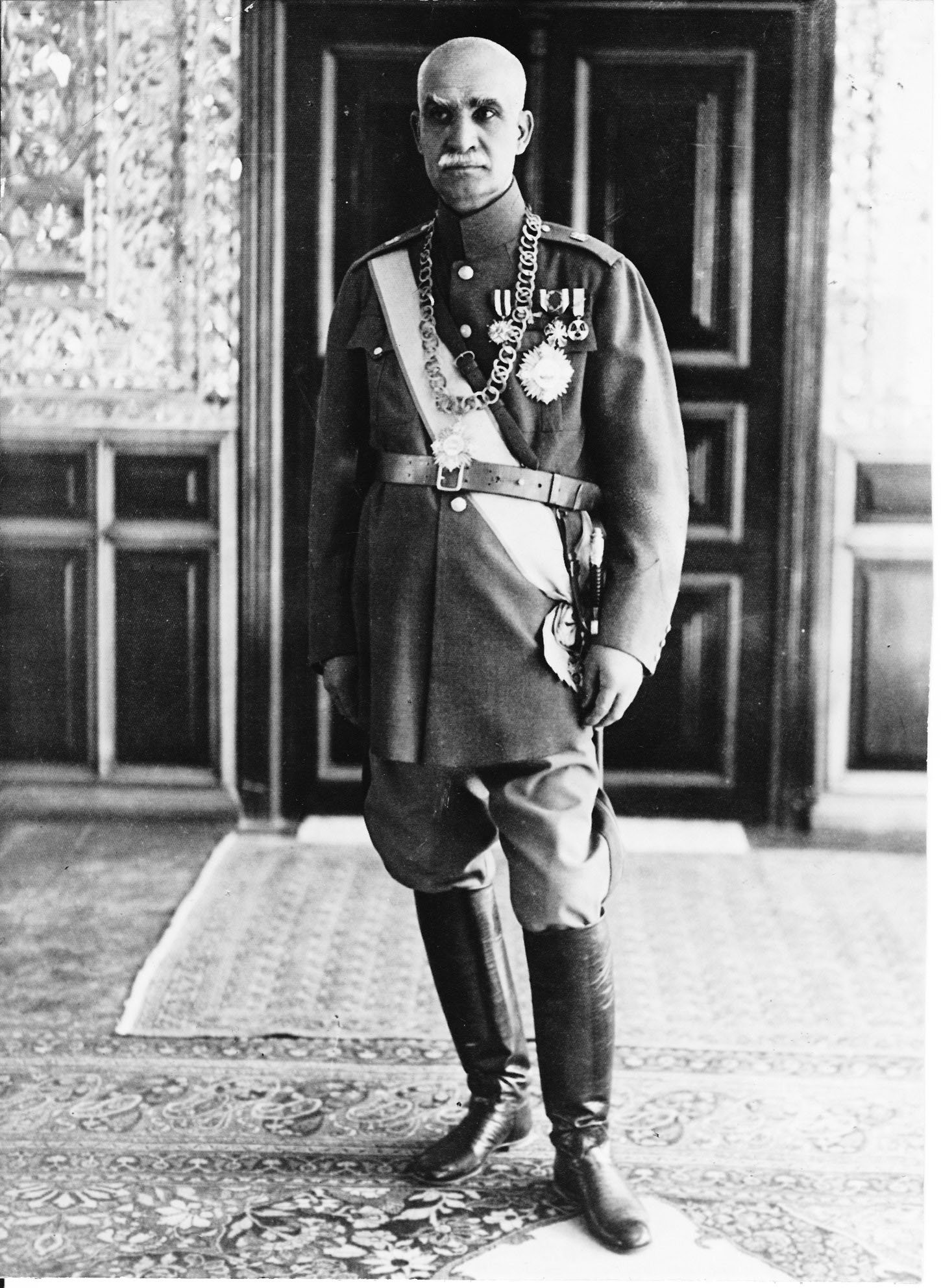 Portrait en pied de Reza Chah dans les année 1930